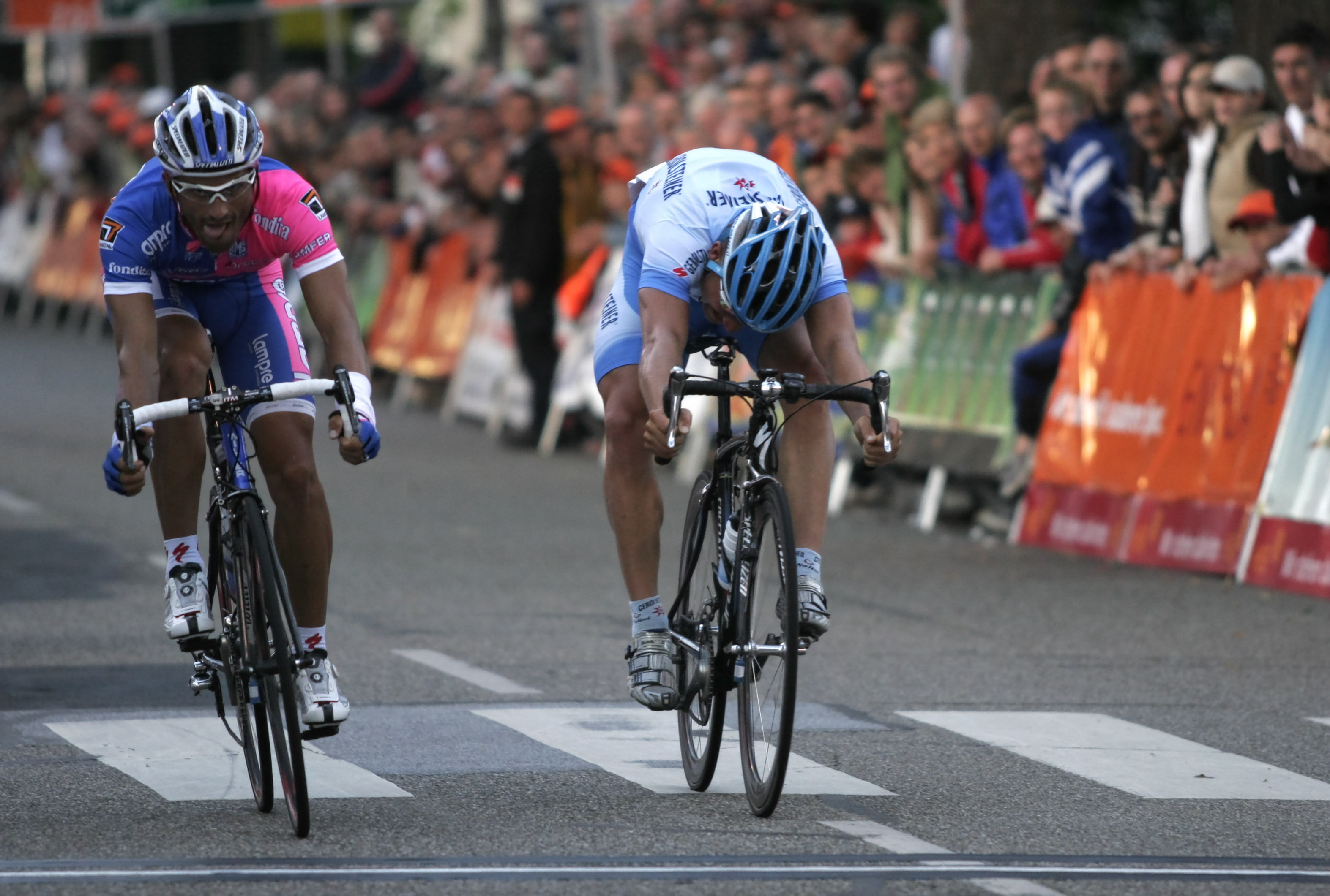 Tigersprung im Radsport. In der Bildmitte Robert Förster (Team Gerolsteiner) mit dem Tigersprung und links Daniele Bennati (Team Lampre-Fondital)